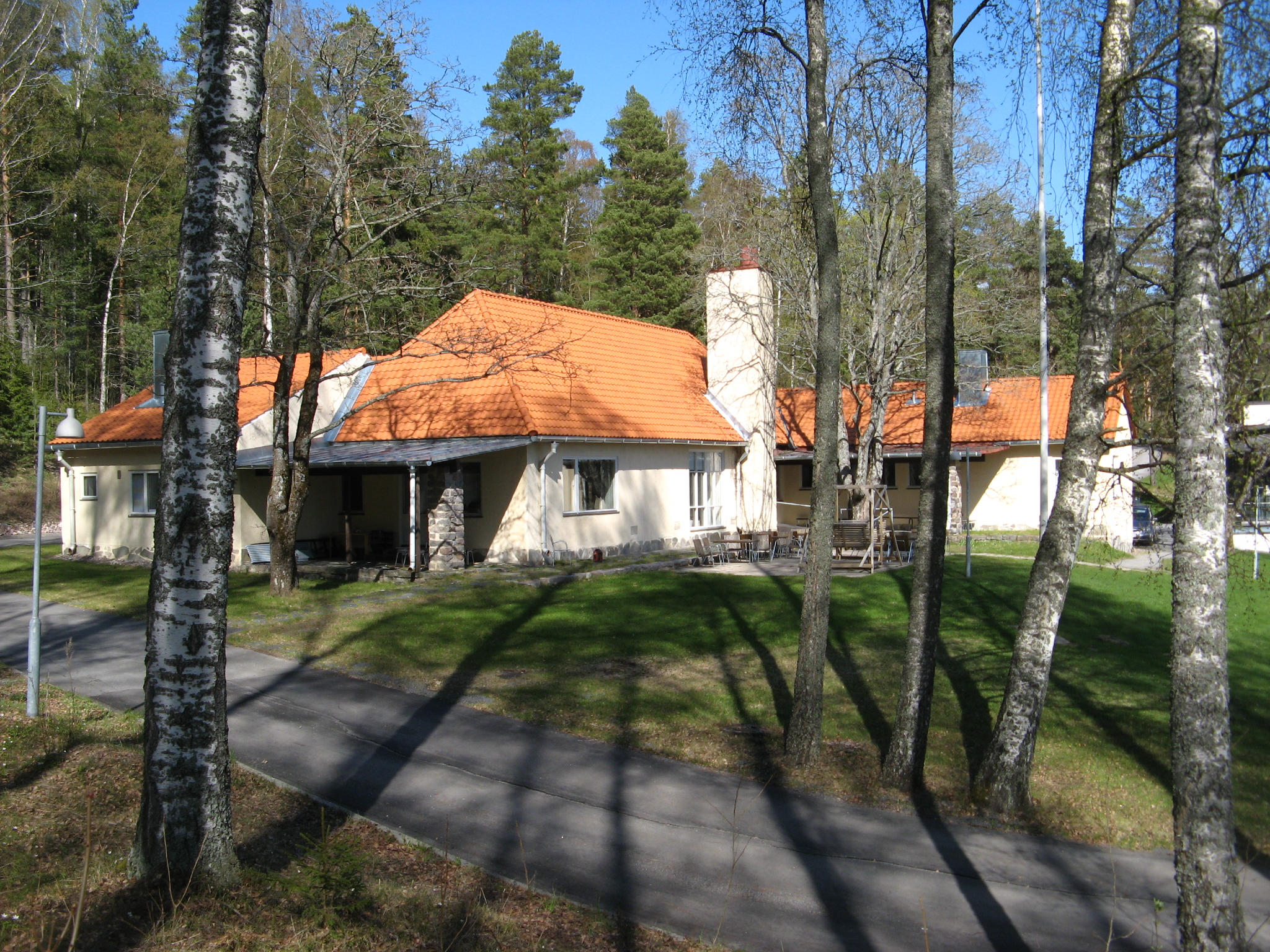 Villa Staffans på Kakskerta, Senaps lägergård. Huset är ritat av Erik Bryggman på 1940-talet.